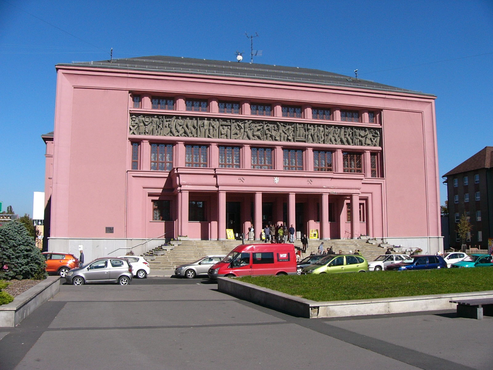 Ansicht von Sokolov